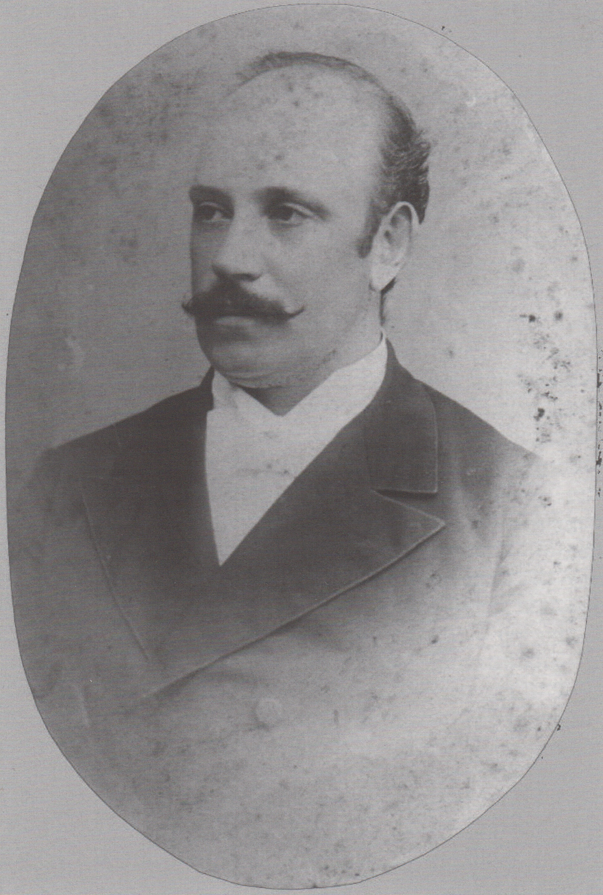 Ritratto di Francesco Gabrielli (1857-1899), insegnante di ginnastica e pionere del calcio in Italia